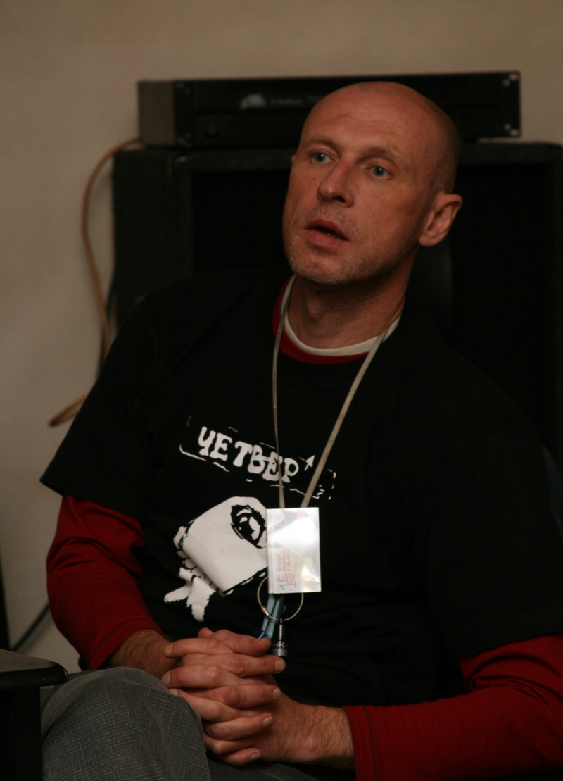 Юрій Іздрик, український письменник